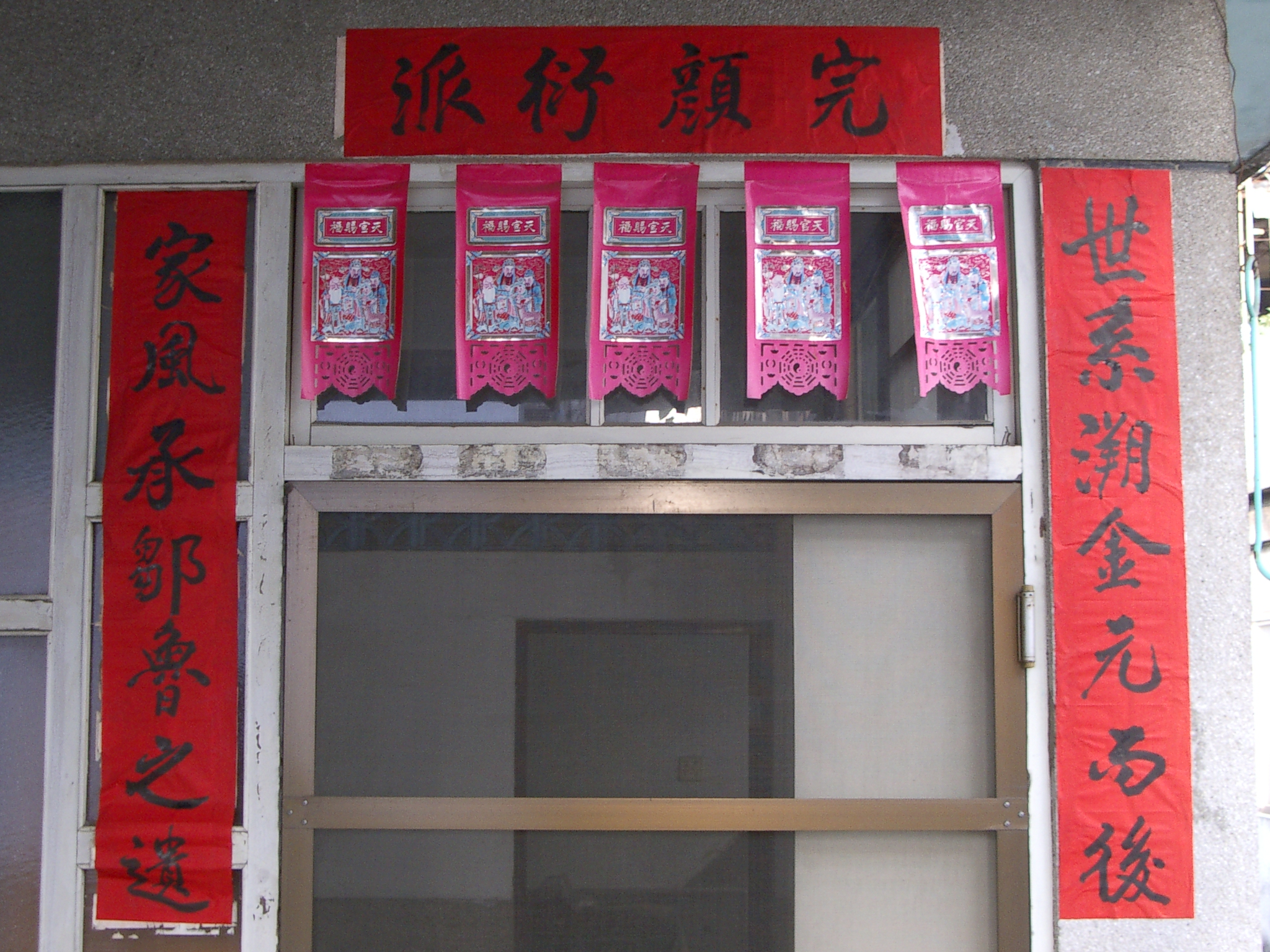 攝影：粘為任 書法：粘忠恕